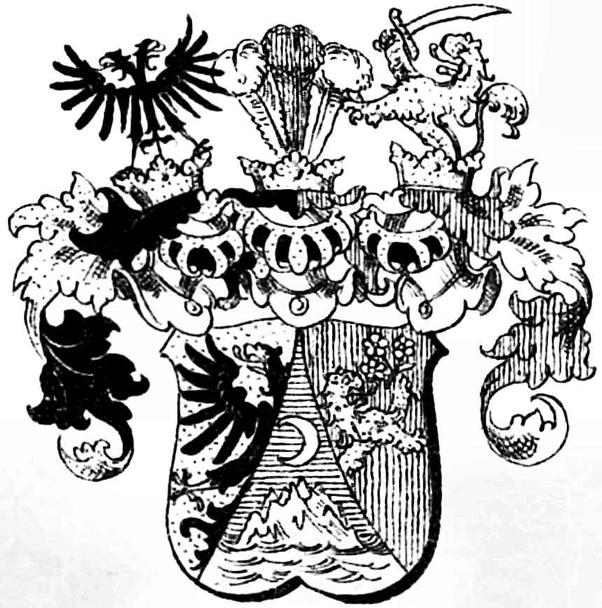 Wappen der Sina de Hodos et Kisdia, ungarischer Adel, 1818